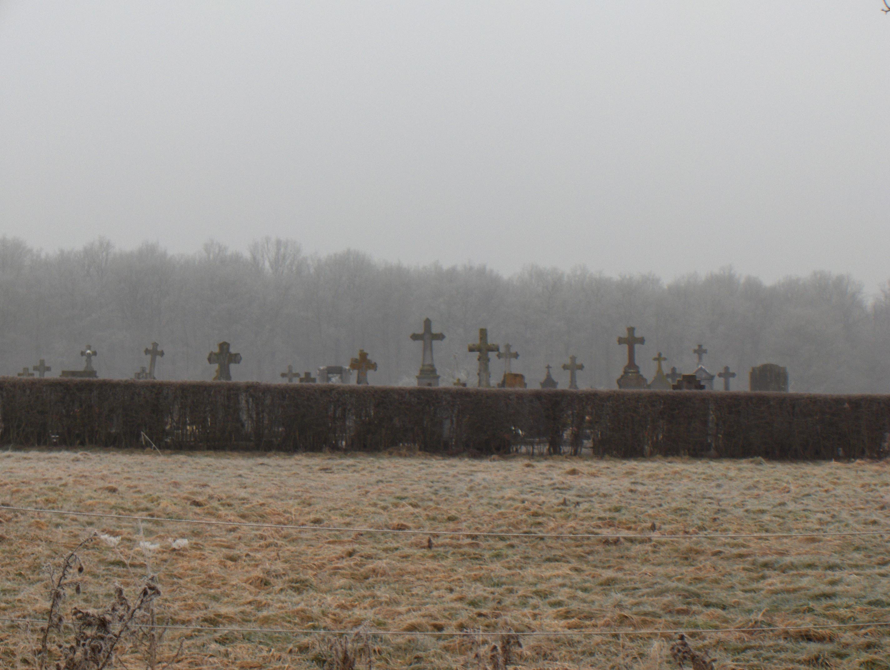 Beschreibung: Géronsart (Weiler, Ortsteil der Gemeinde Couvin in Belgien, Provinz Namur), Friedhof in einem Feld südlich der Pfarrkirche. Datum: 2. Februar 2006 Fotograf: Friedrich Tellberg